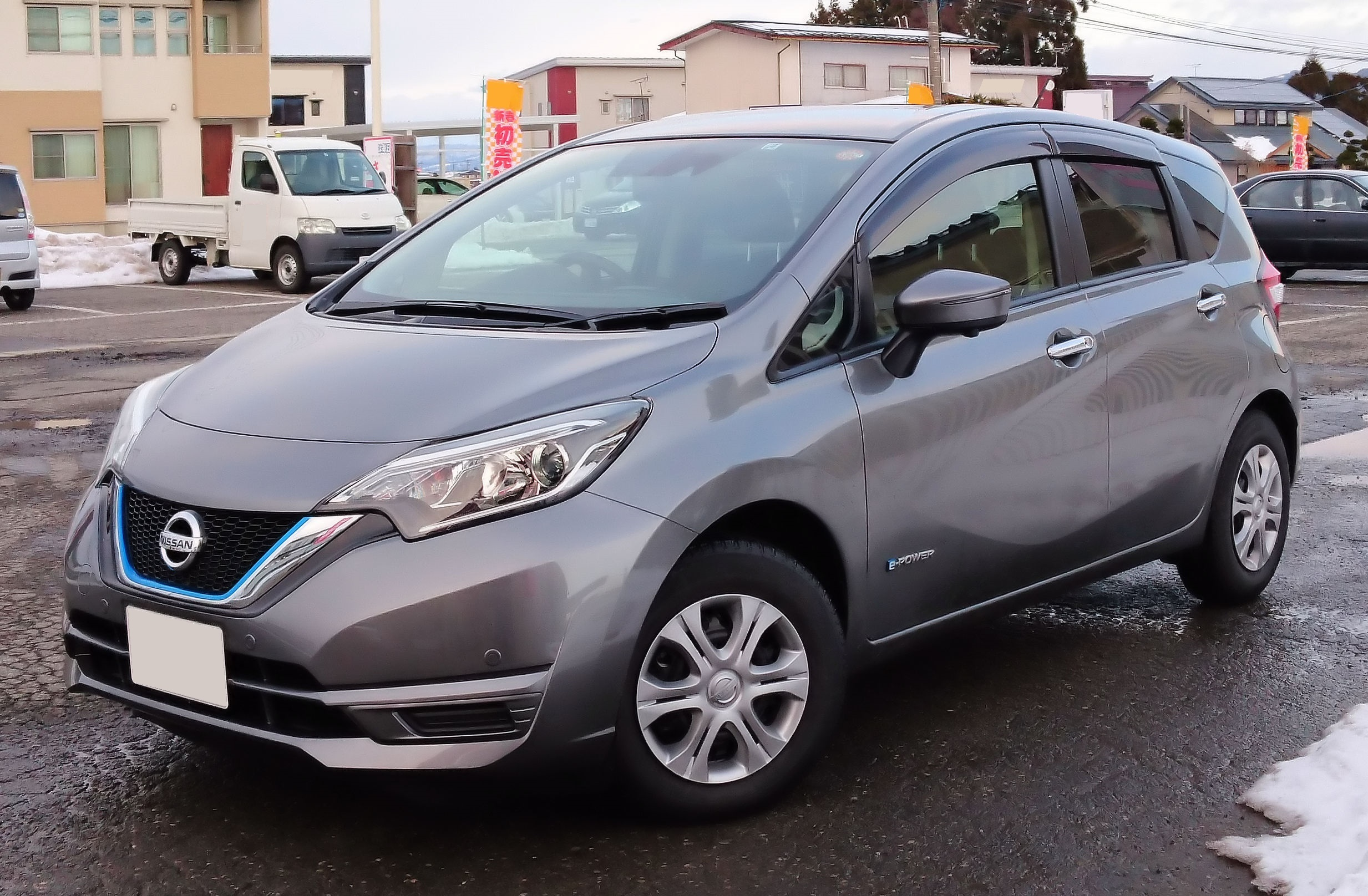 日産ノートe-POWER